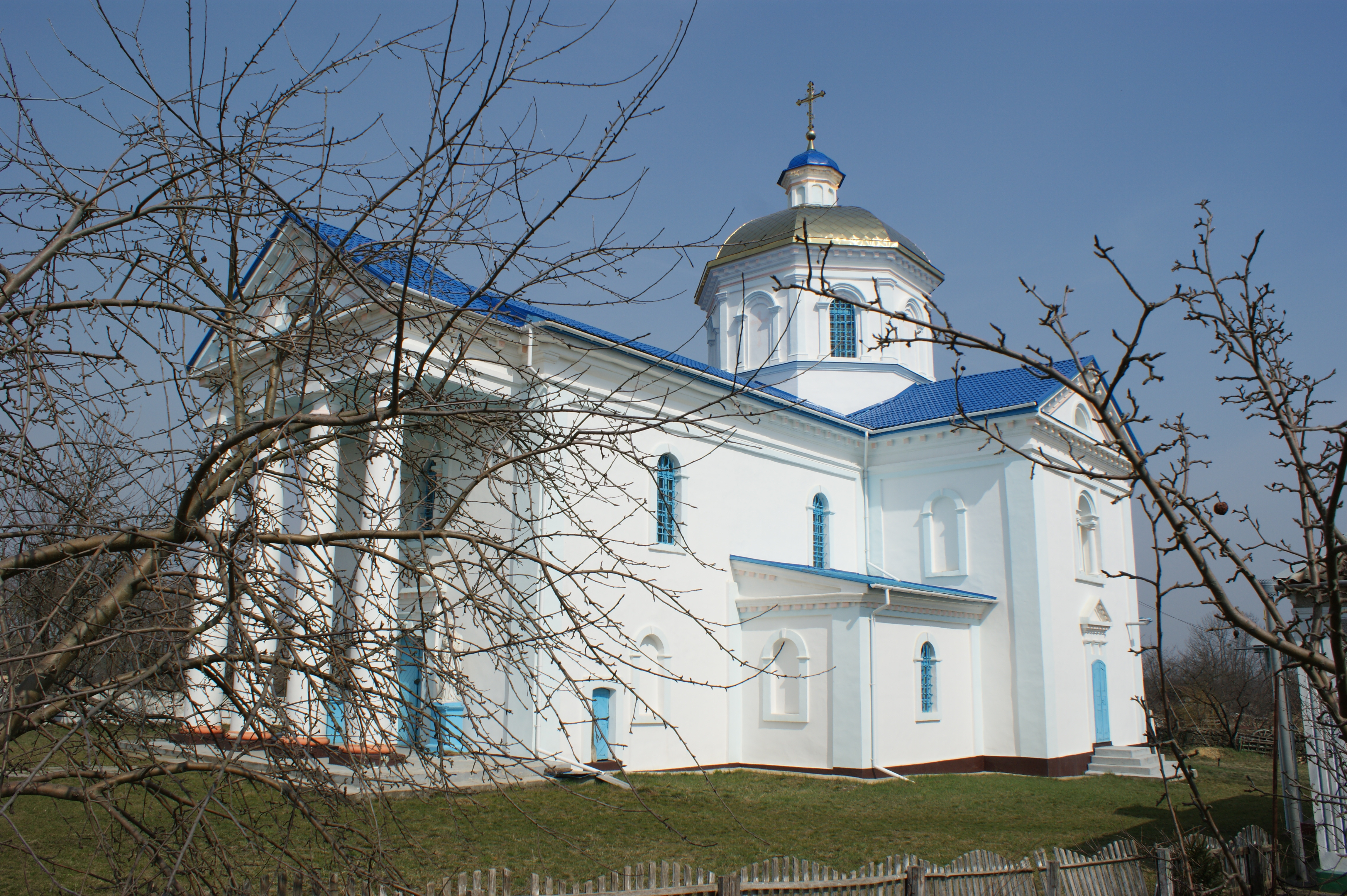 Михайлівська церква, Жабокрич